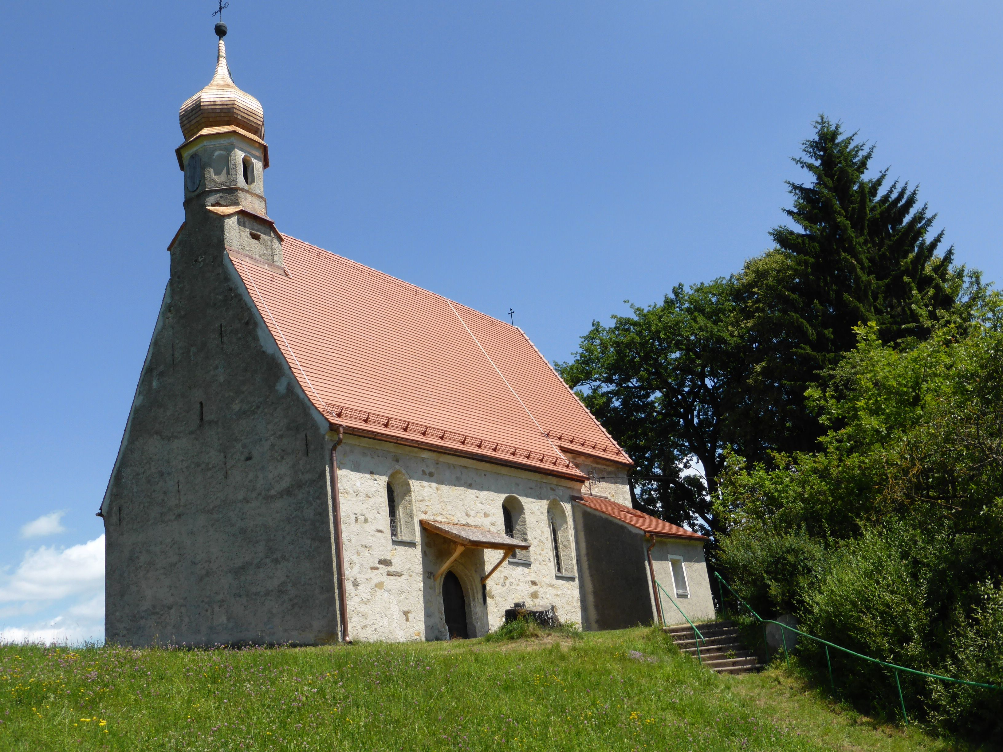 Kath. Filialkirche hll. Johannes der Täufer und Johannes der Evangelist